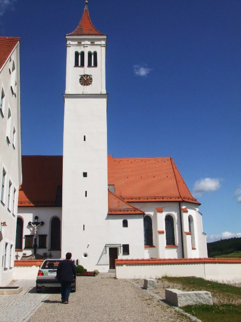 Kath. Pfarrkirche St. Ulrich, Dietershofen, Gemeinde Oberschönegg, Landkreis Unterallgäu